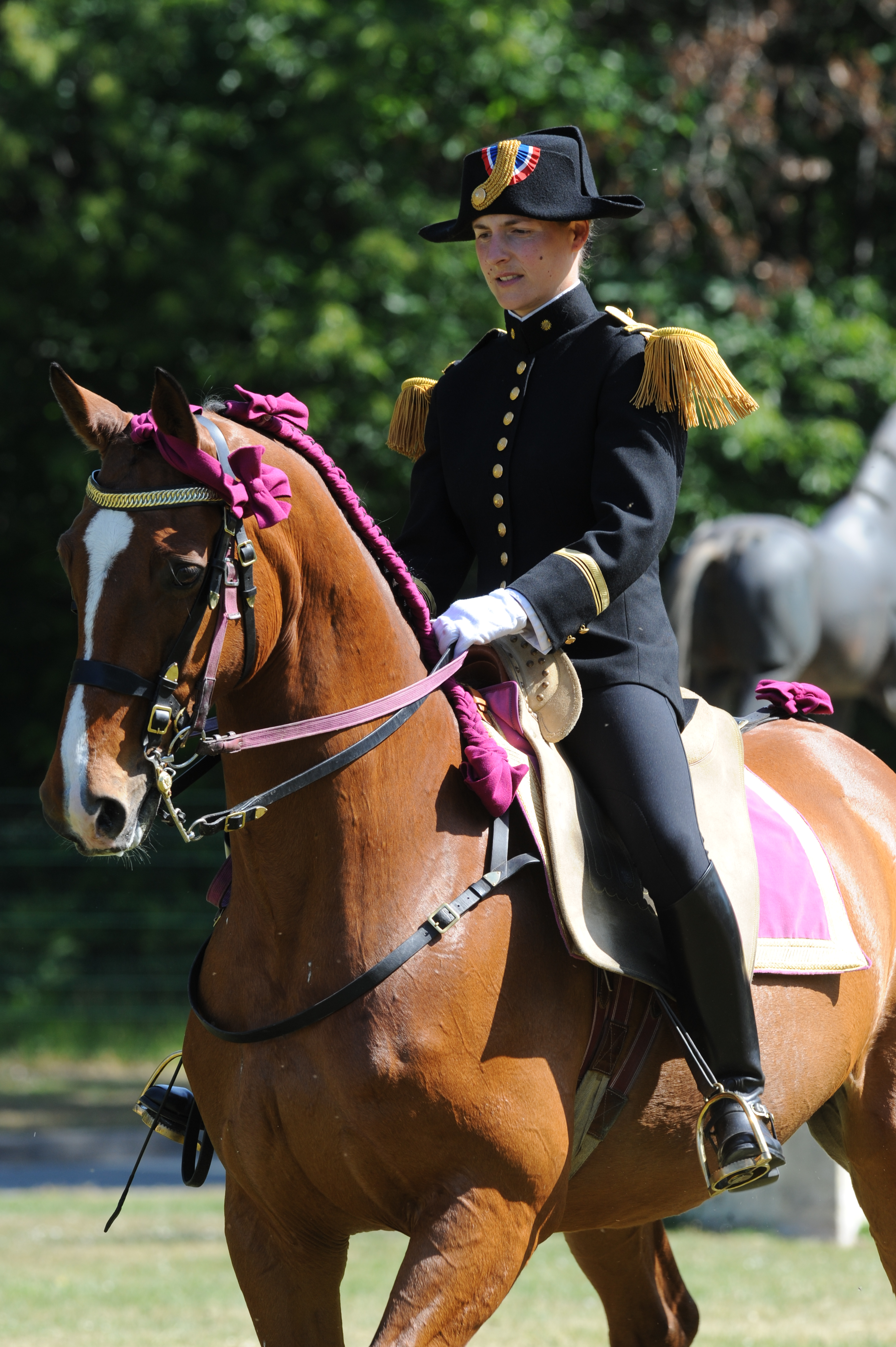 Pauline Basquin, femme écuyer du Cadre noir.